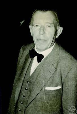 Foto di Othmar Baier